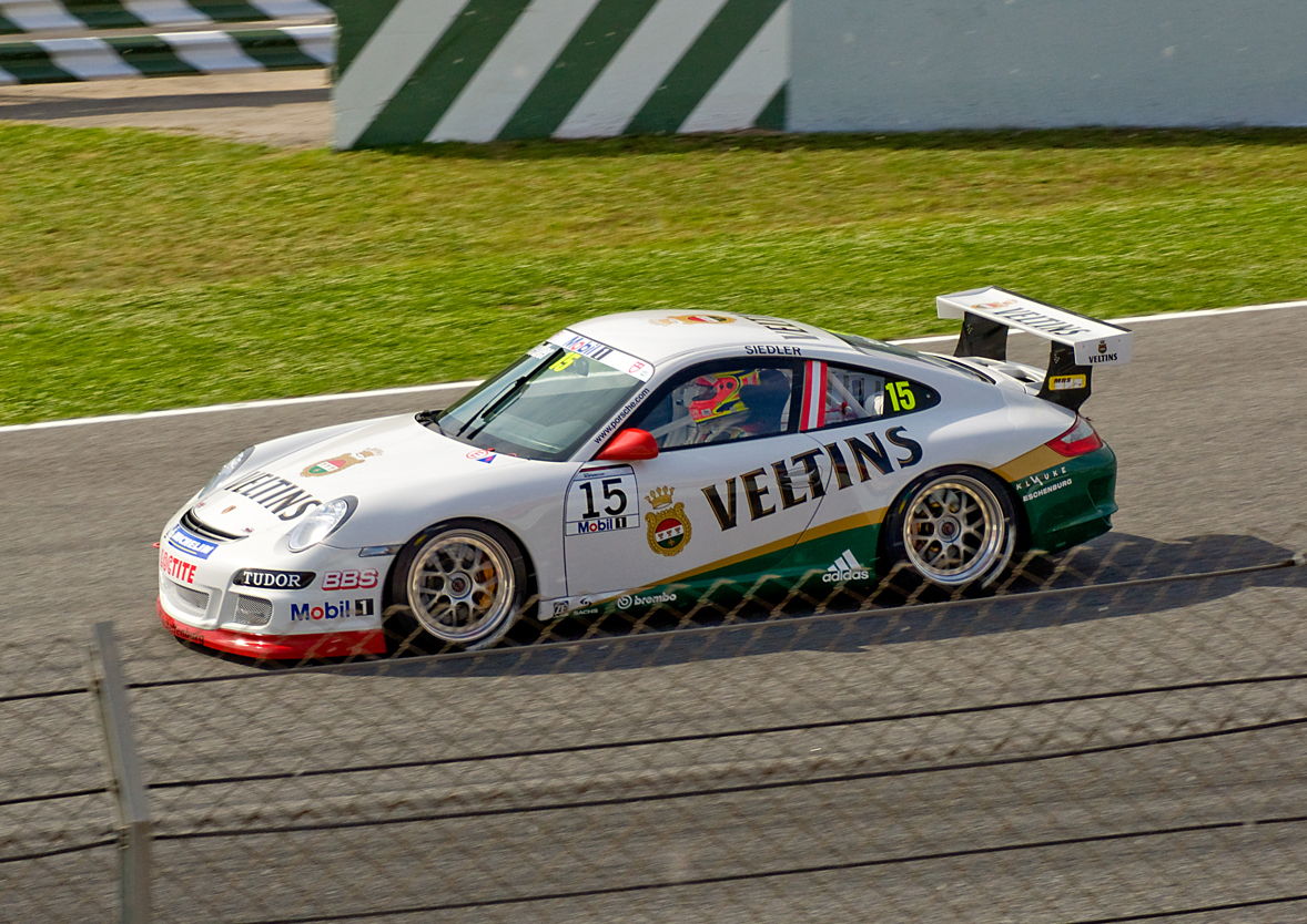 Norbert Siedler in Porsche Supercup at Circuit de Catalunya in 2009. Original description from Flickr: Nikon D90 + Sigma 18-200 DC OS HSM 1/500s - F/13 - 90mm - ISO400